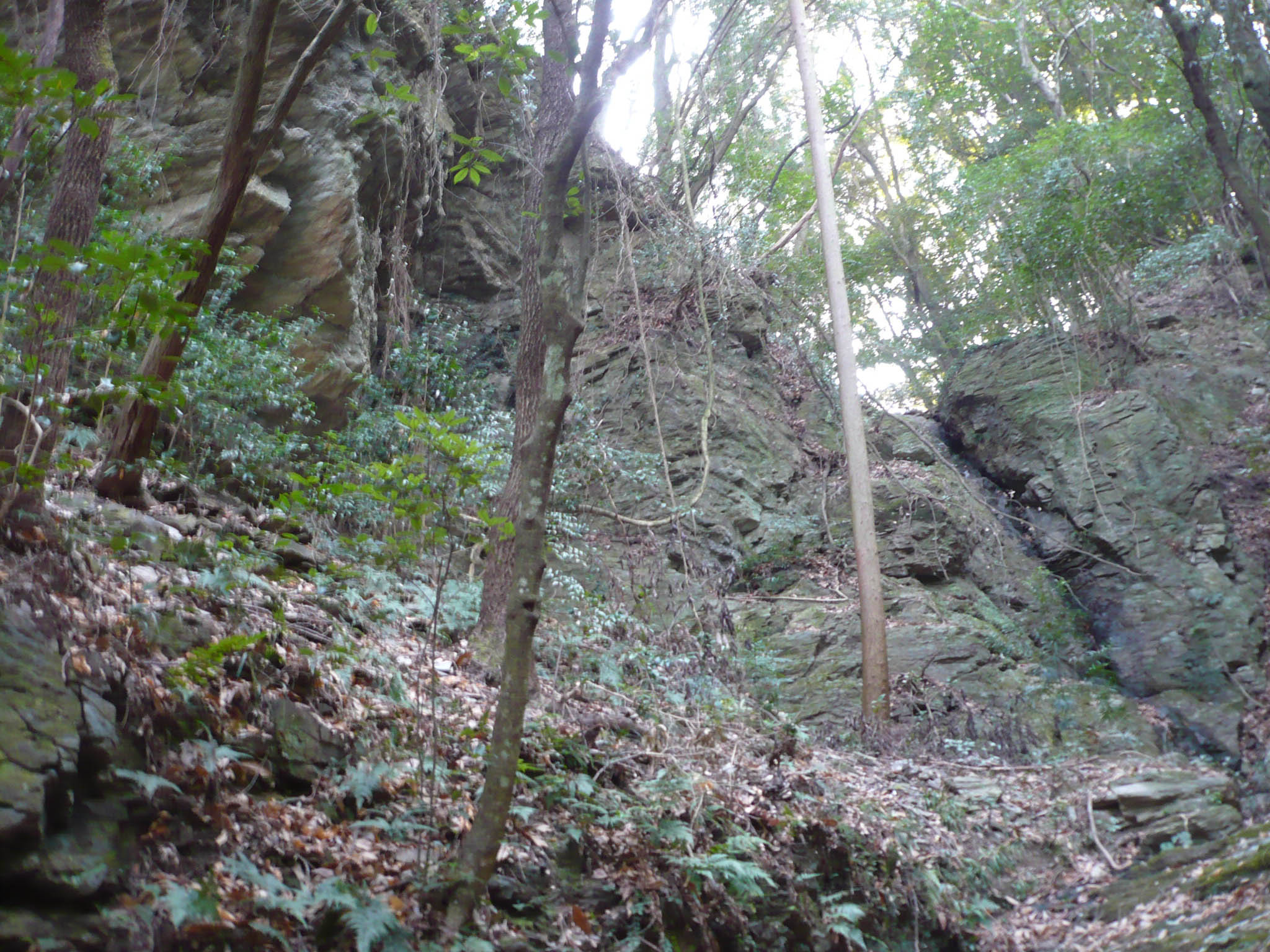 陰滝と石切場